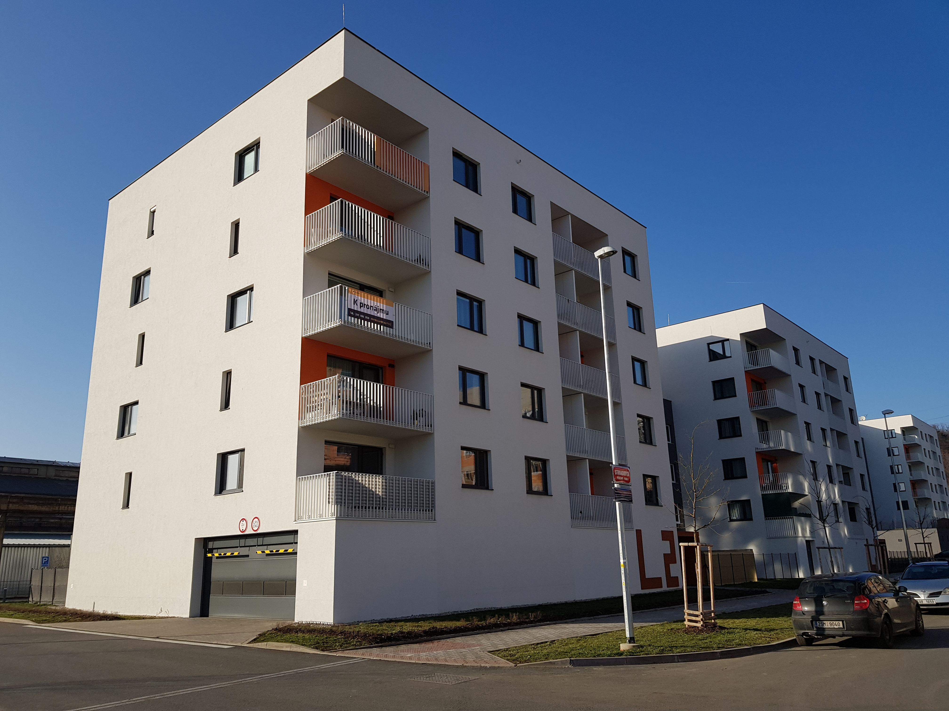 Dům Strhadových 1006/1 a 3, Praha 9-Vysočany